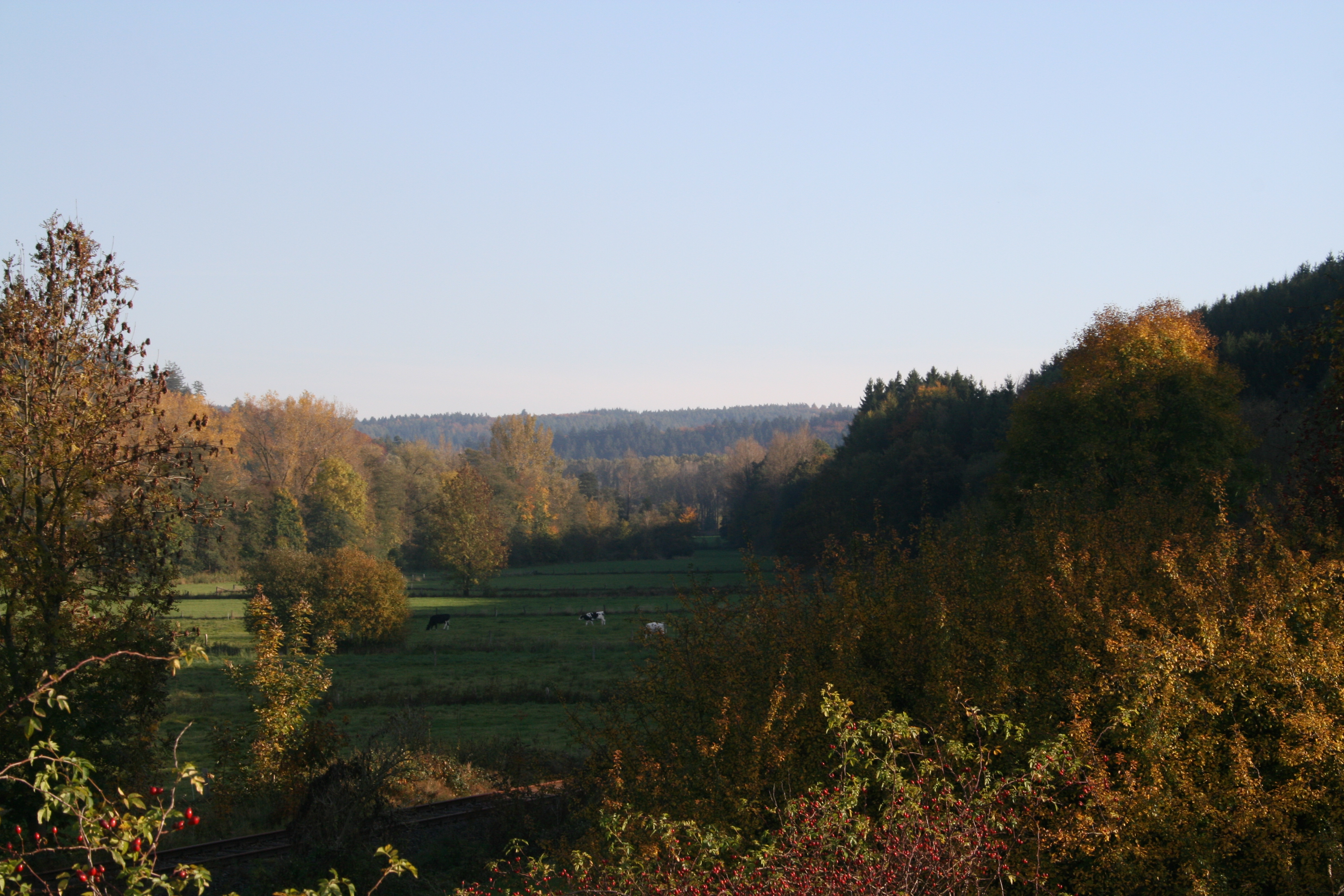 Das Almetal im Herbst 2008; Bild des Almetal bei Siddinghausen im Herbst 2008